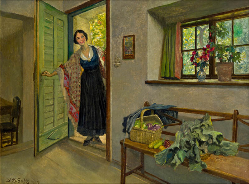 Die Besucherin